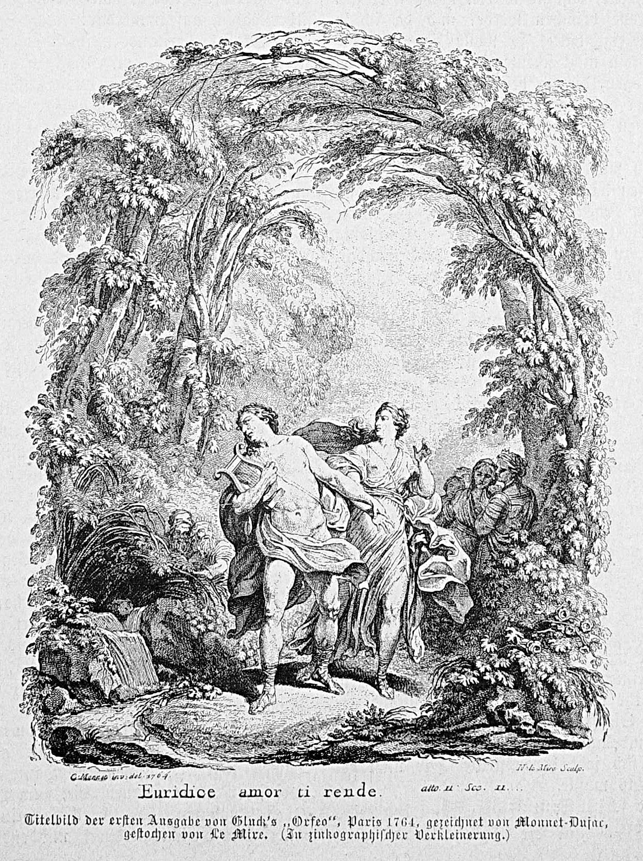 Bild aus Seite 757 in "Die Gartenlaube". Image from page 757 of journal Die Gartenlaube, 1887.